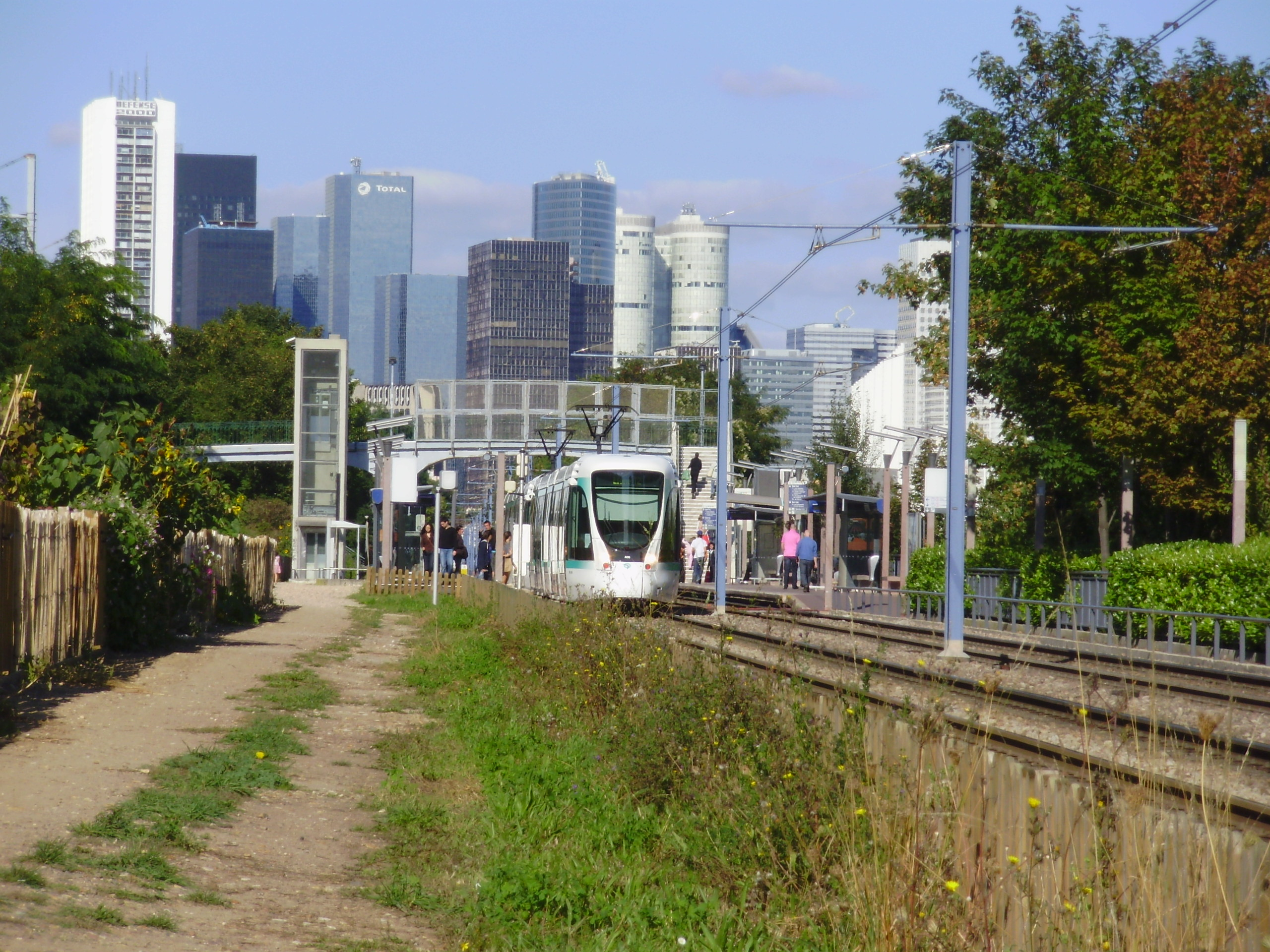 Tramway de la ligne T2 quittant la station Belvédère (Suresnes, Hauts-de-Seine, France) vers Porte de Versailles.